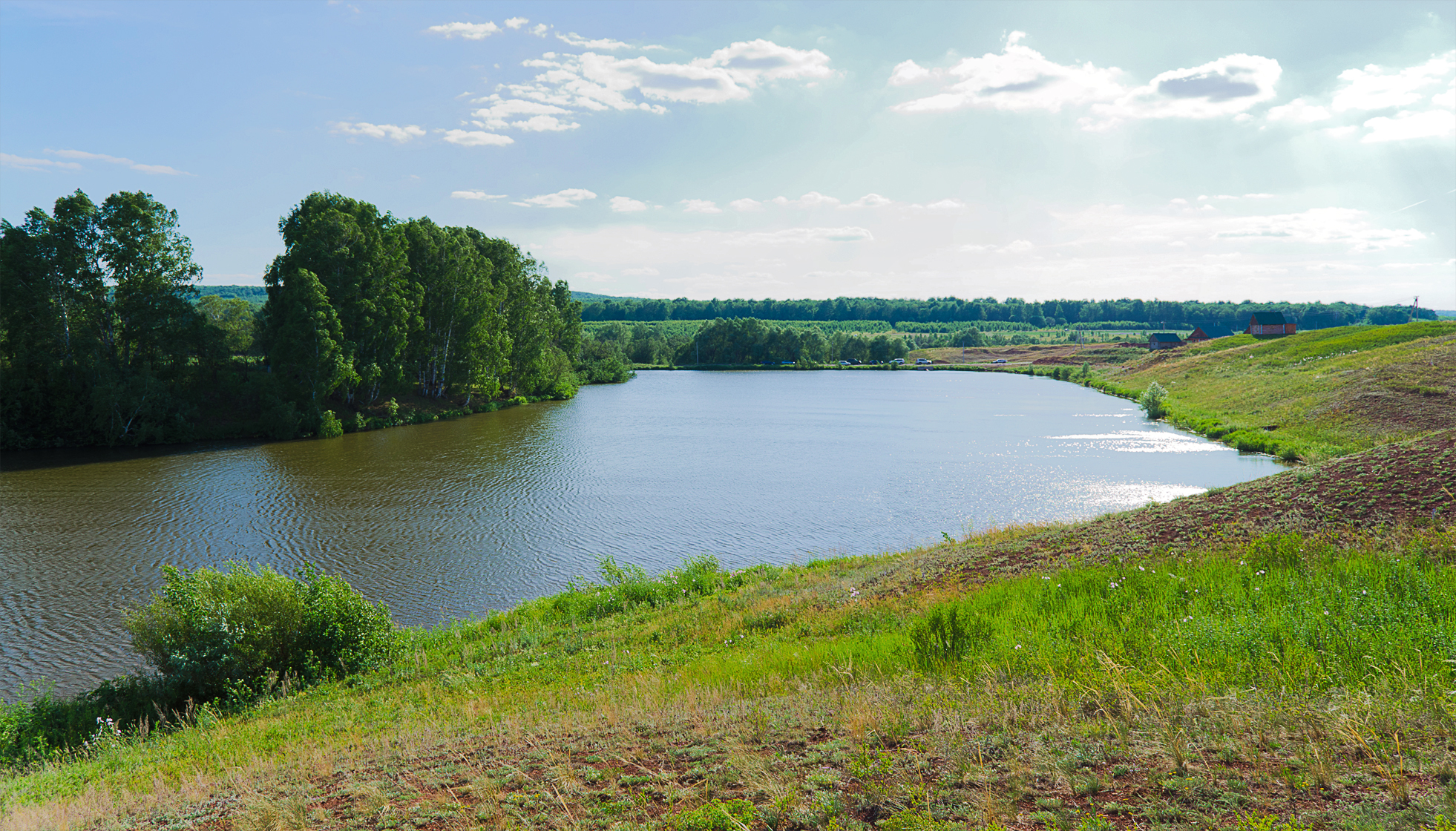 Пруд возле хутора Подлесный на р. Караталка